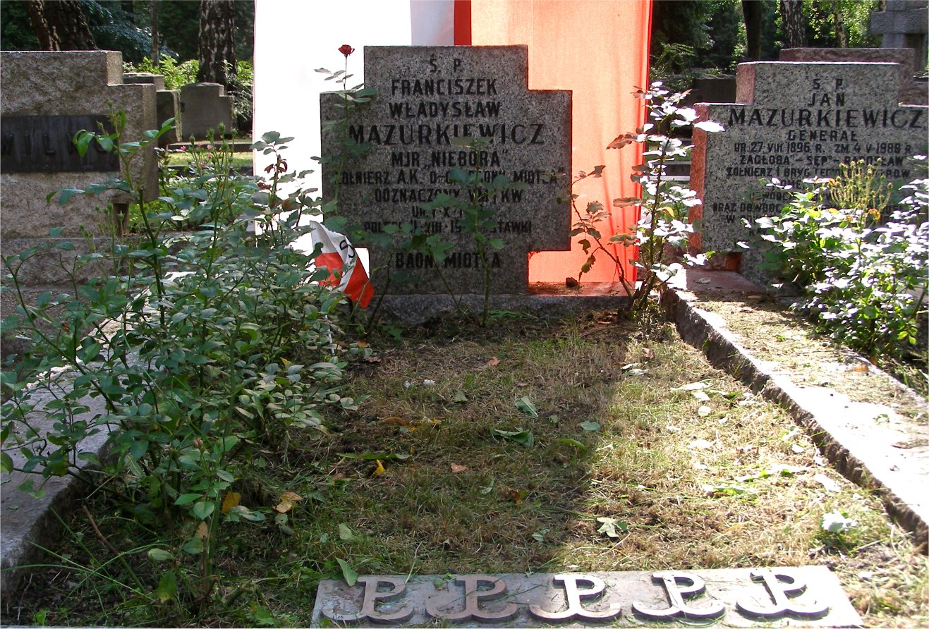 Grób Franciszka Mazurkiewicza na Powązkach wojskowych w Warszawie (fot Zu)